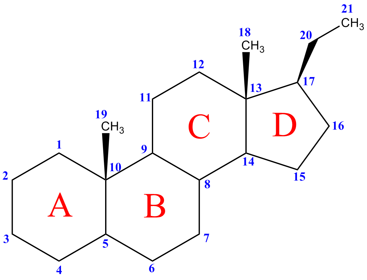 pregnano (numerado)